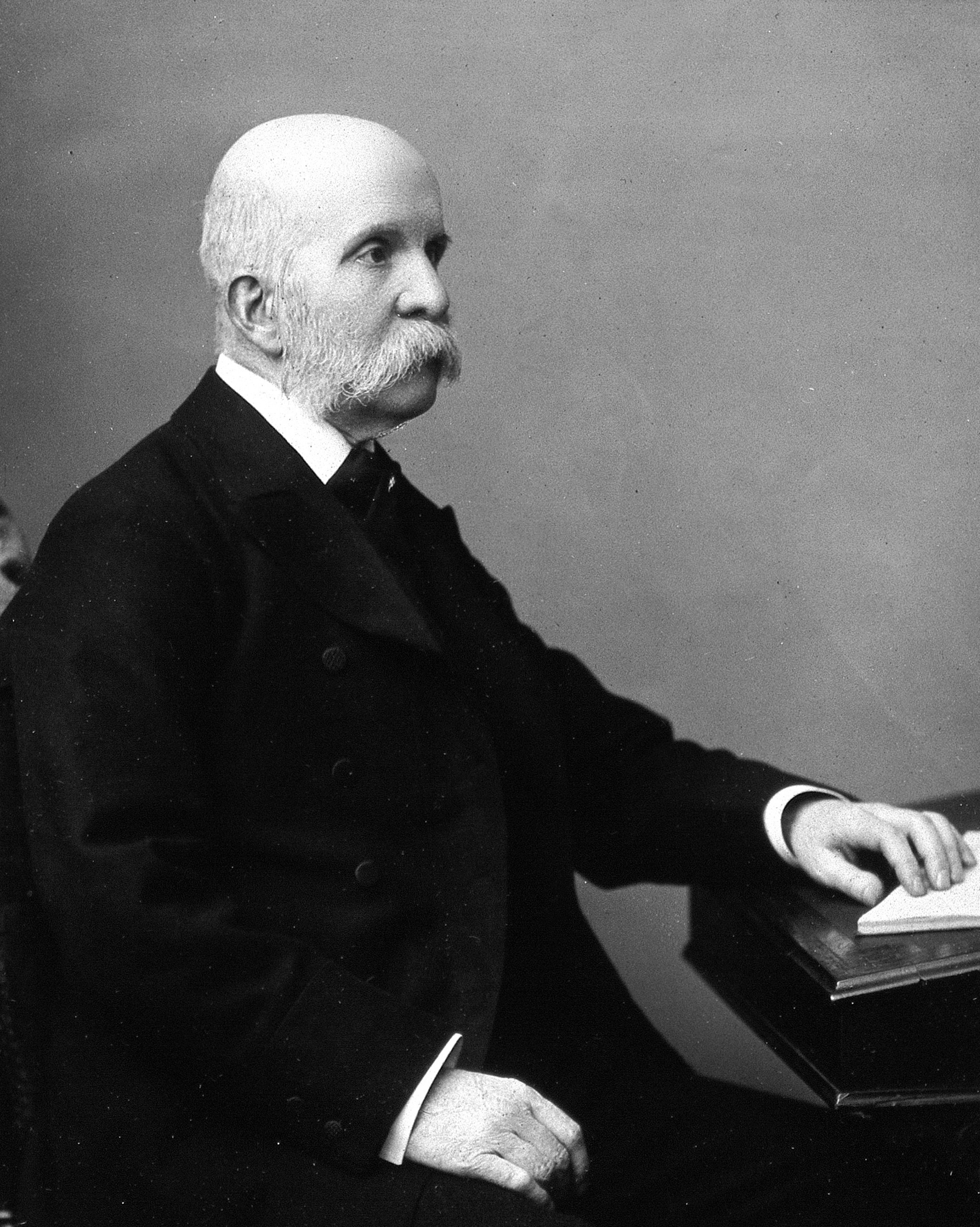 Sir John Furley